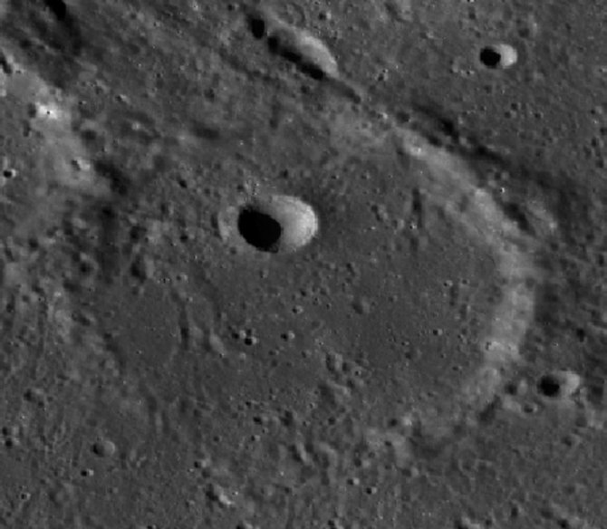 Cráter lunar Oersted. (Imagen LRO)